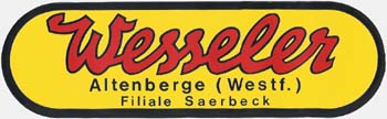 Logo des Schlepperherstellers Wesseler